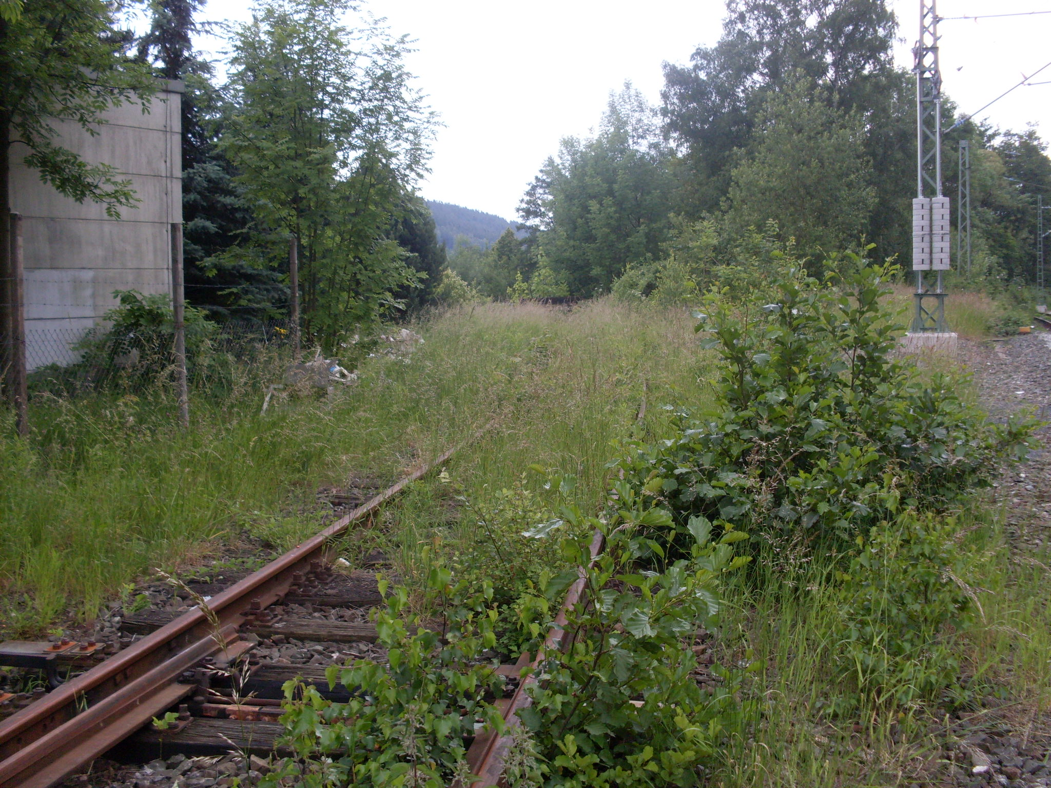 Der Abzweig der ehemaligen Rodachtalbahn in Kronach.